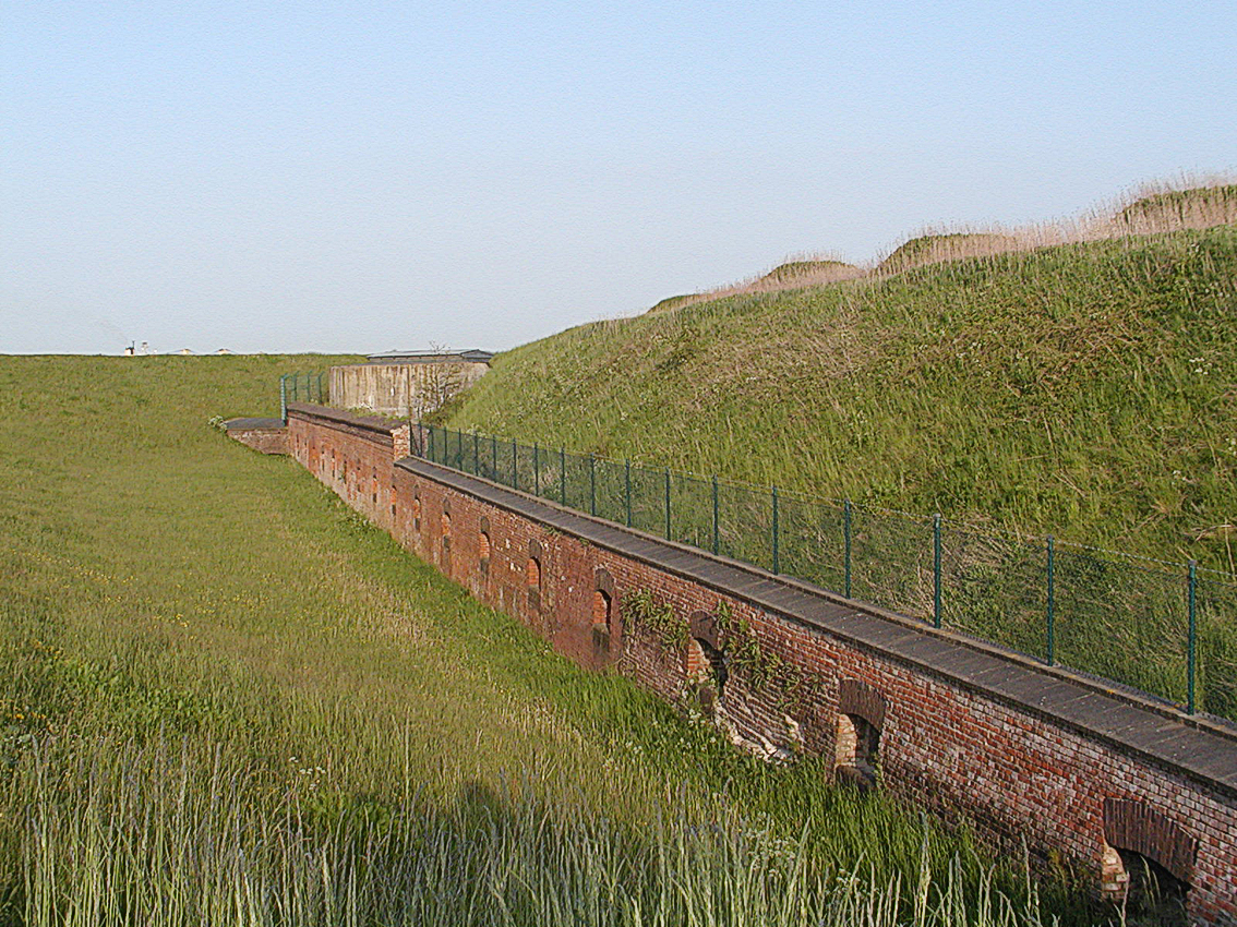 Die Mauer in der Seeseite